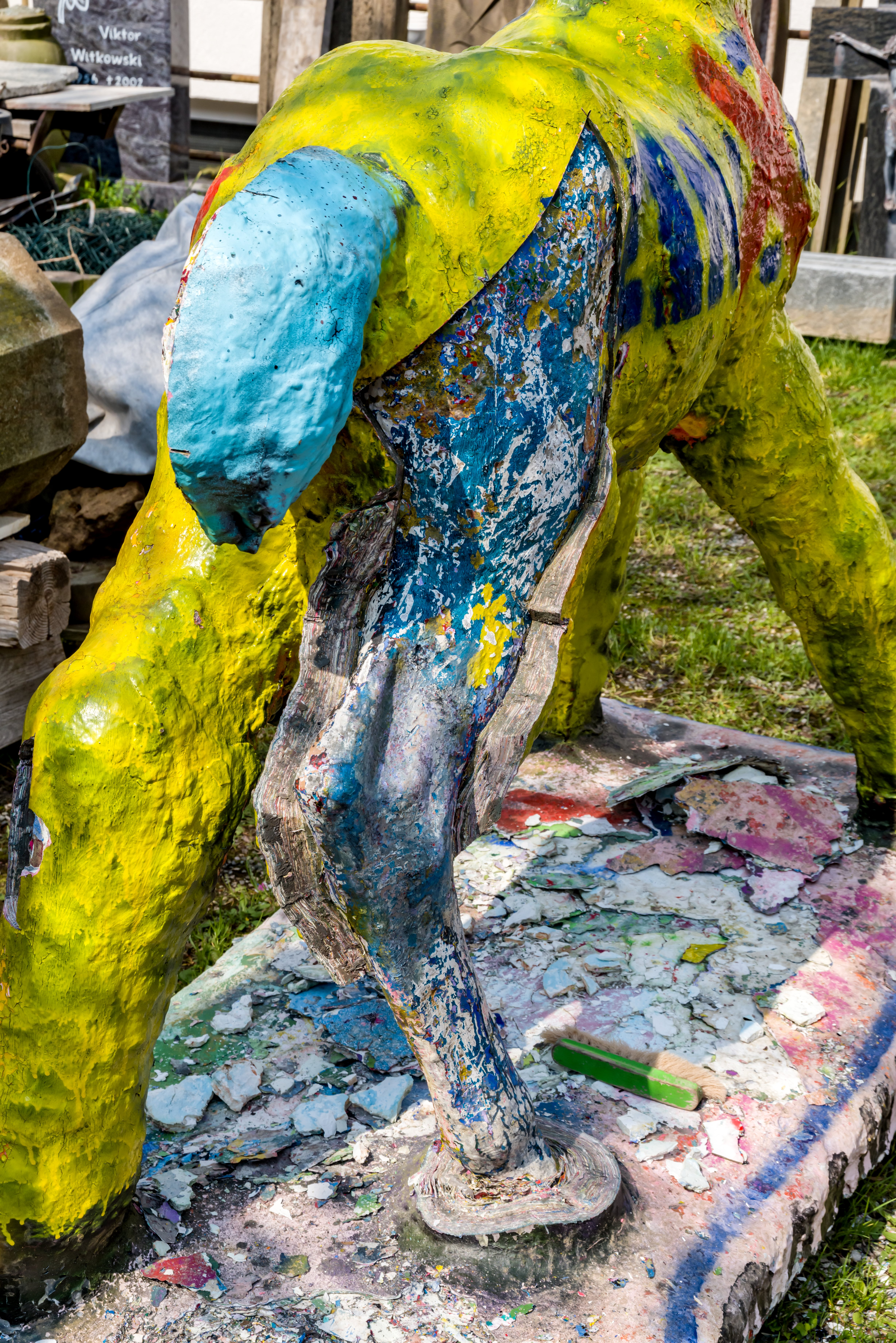 Espresso